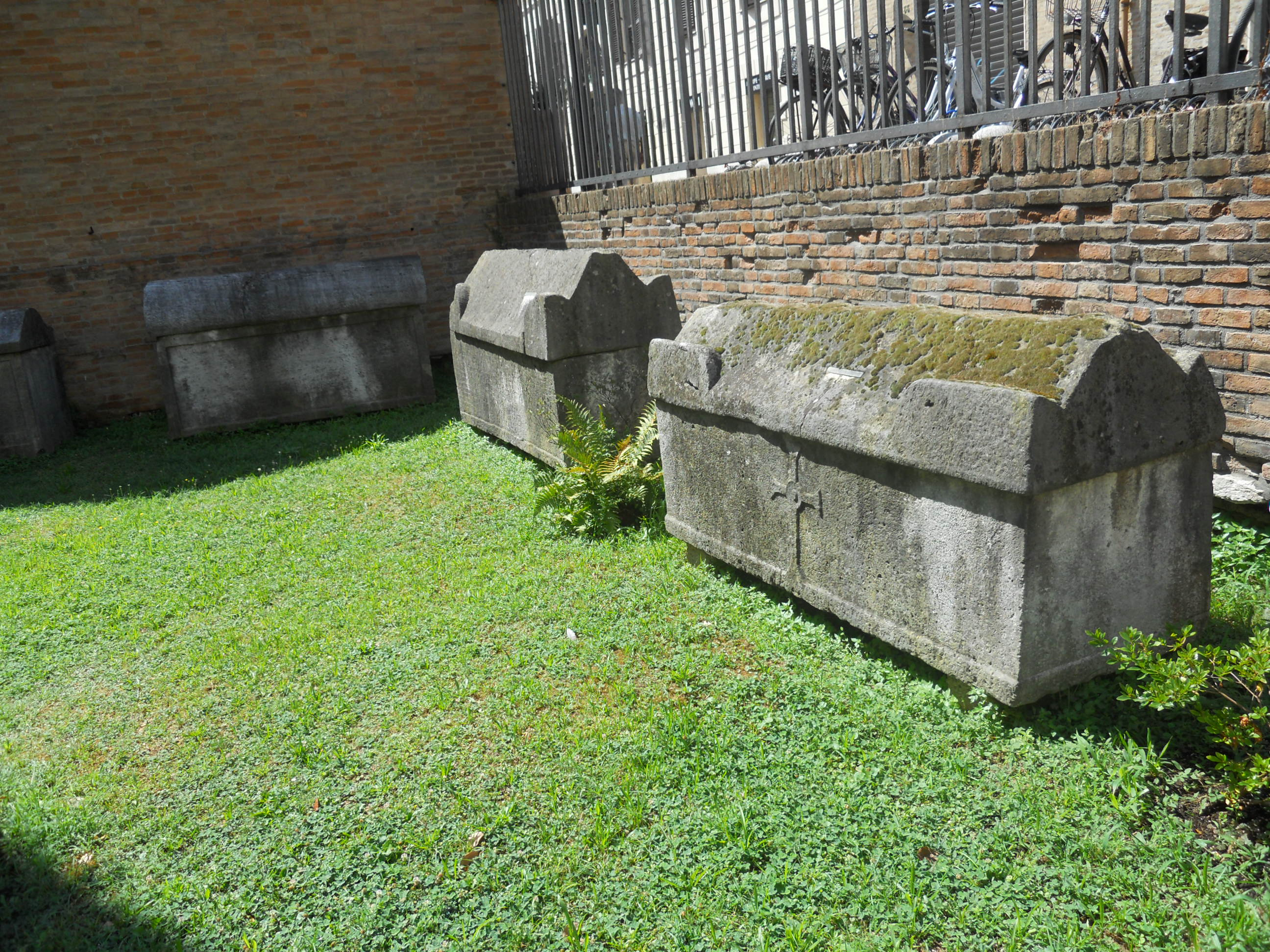 I sarcofagi situati lungo il perimetro interno del giardino antistante la Basilica di Sant'Agata Maggiore in Ravenna.